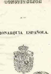 Constitución española de 1845